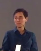 Remise de la médaille Fields à Maryam Mirzakhani